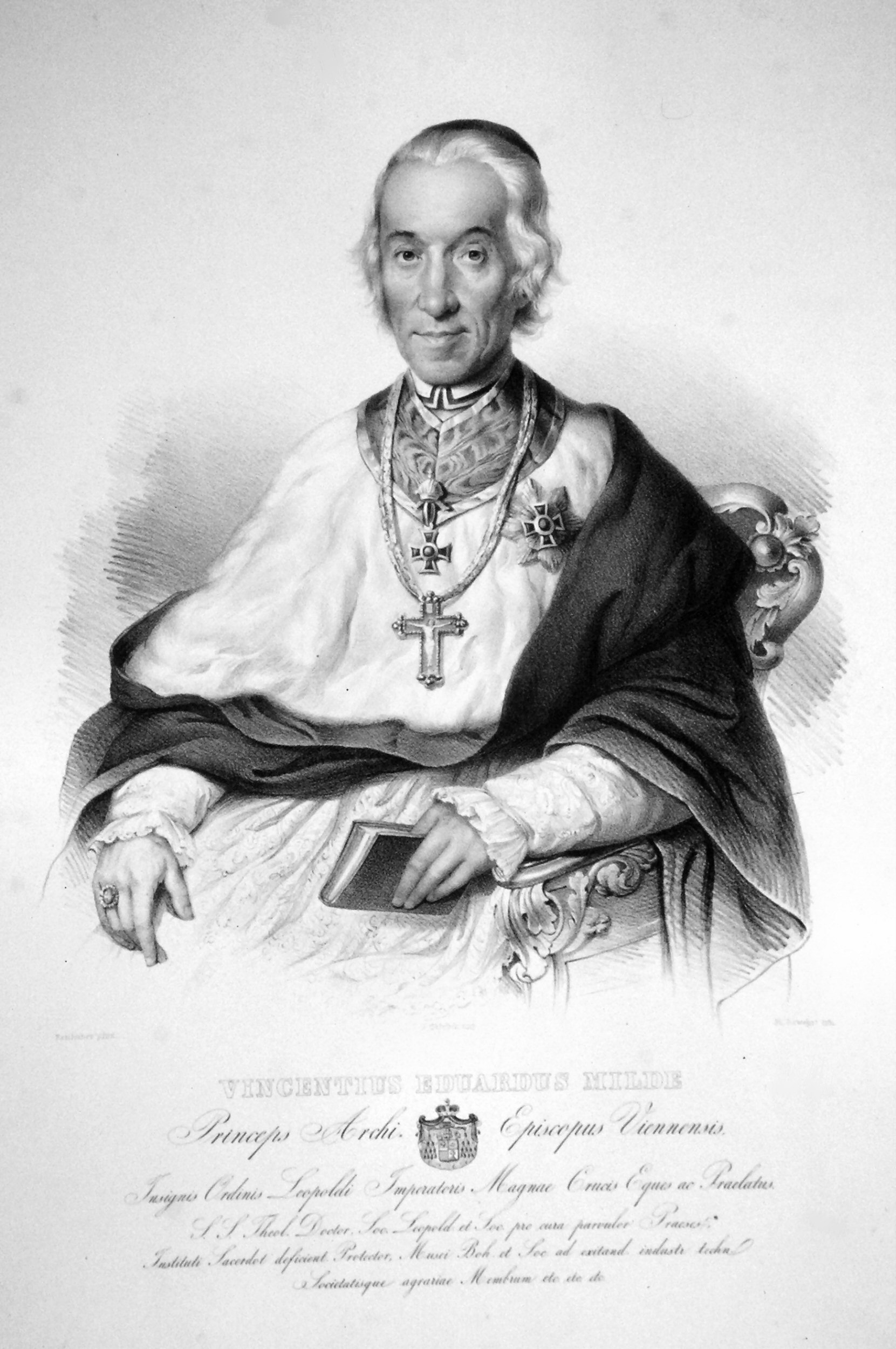 Vincenz Eduard Milde, Lithographie von Josef Kriehuber